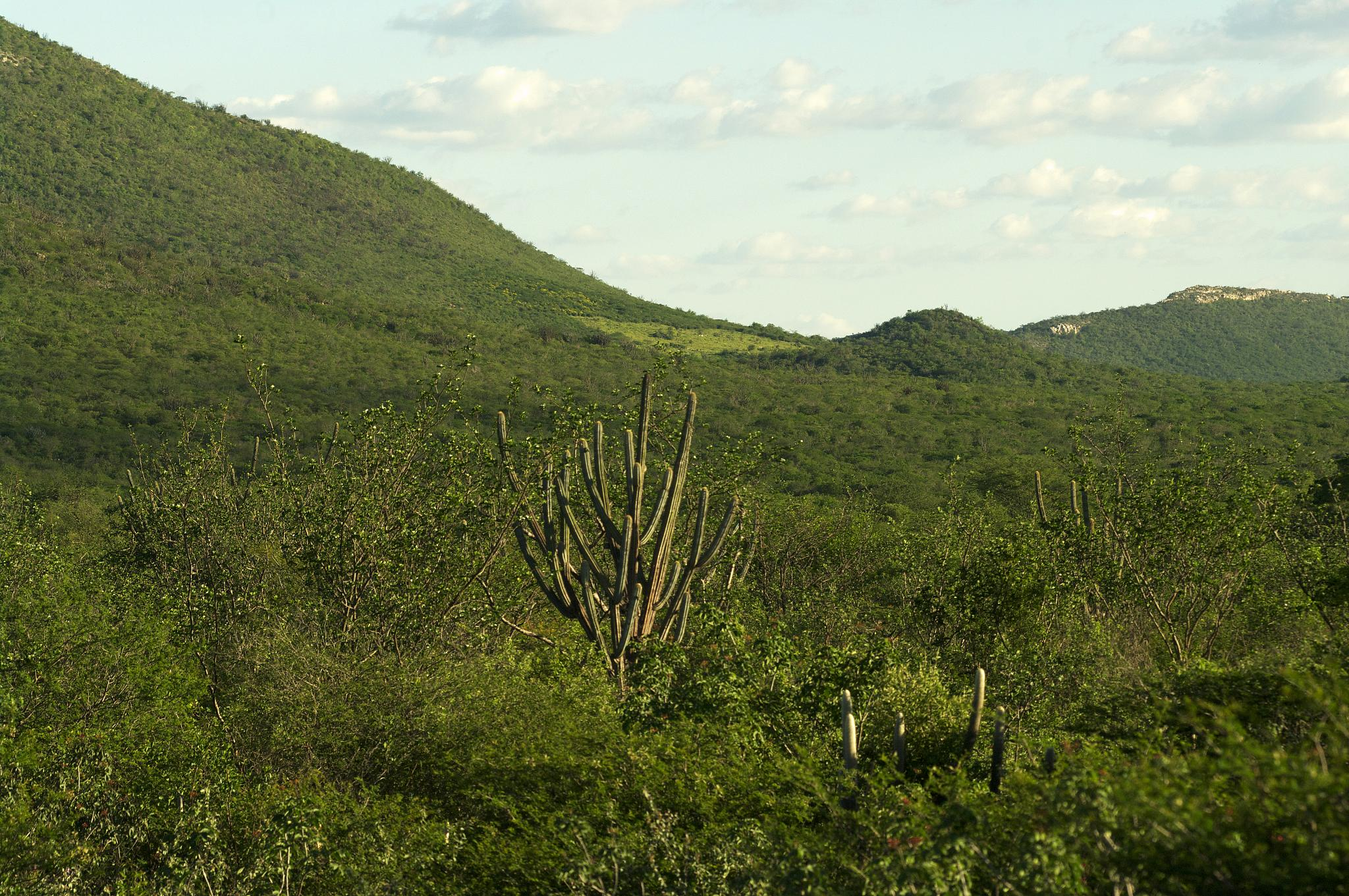 A ultima serra antes do Vale do São Francisco